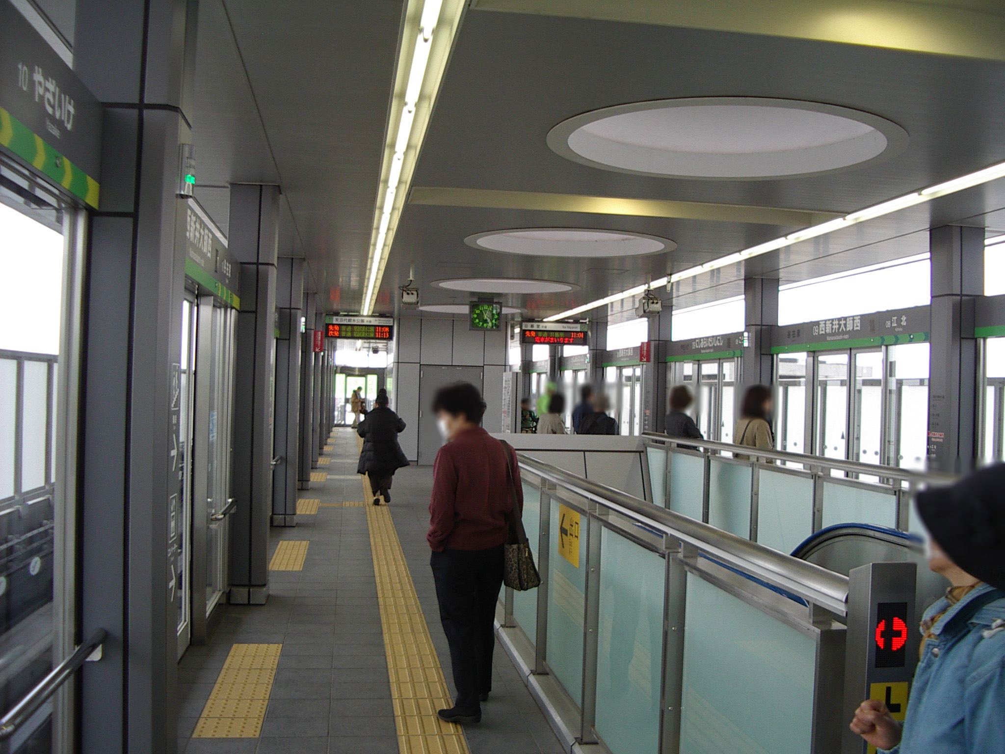 日暮里・舎人ライナー西新井大師西駅